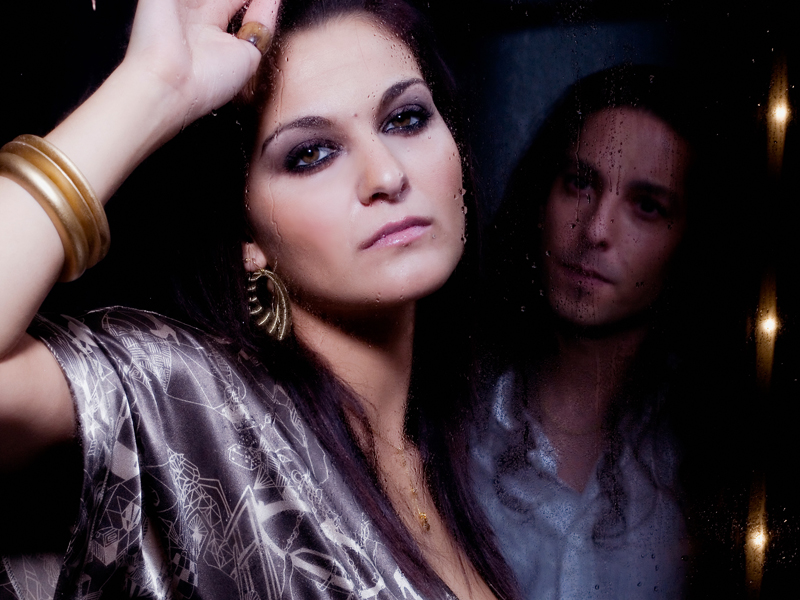 Fotografía de Mesalla